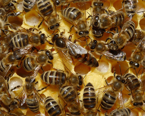 Reine d'abeille domestique (Apis mellifera) entourée d'ouvrières